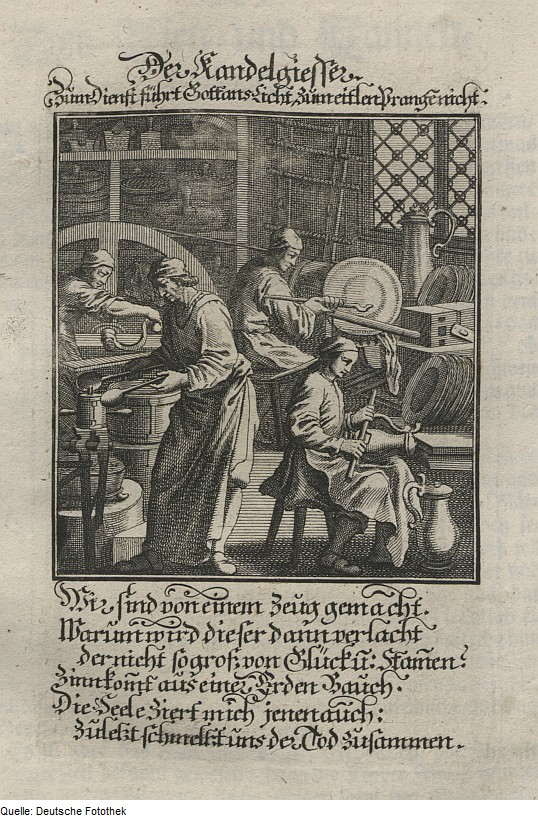 Original image description from the Deutsche Fotothek Ständebuch & Beruf & Handwerk & Kannengießer & Gießer & Zinngießer & Zinn